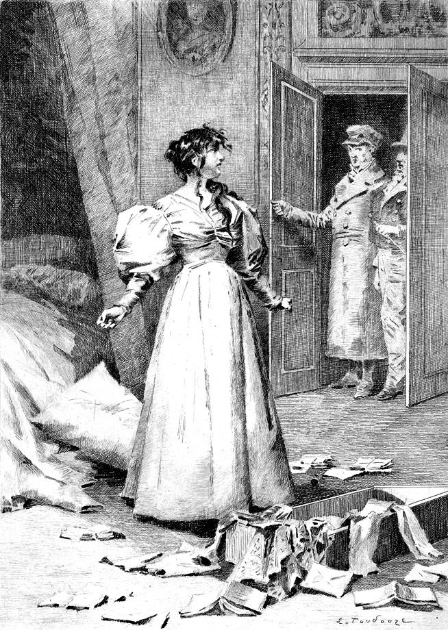 Illustration of Honoré de Balzac's Gobseck (1830): Mme de Restaud, Gobseck and Derville.